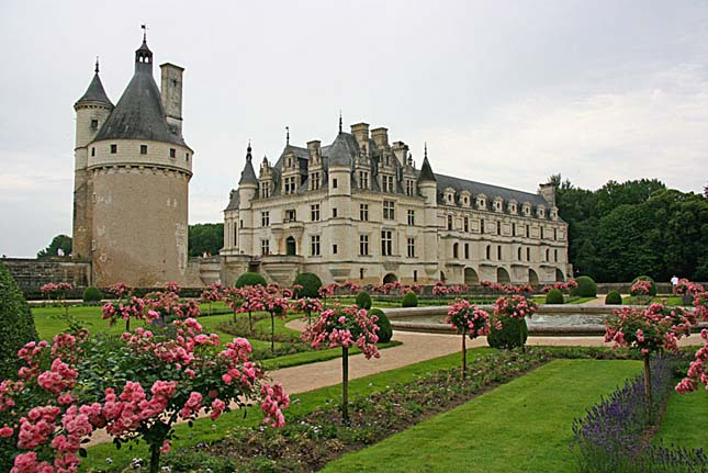 Chenonceau